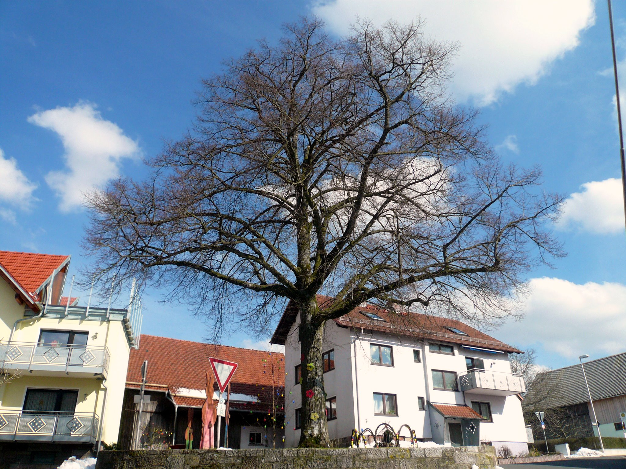 Dorflinde in Singenrain